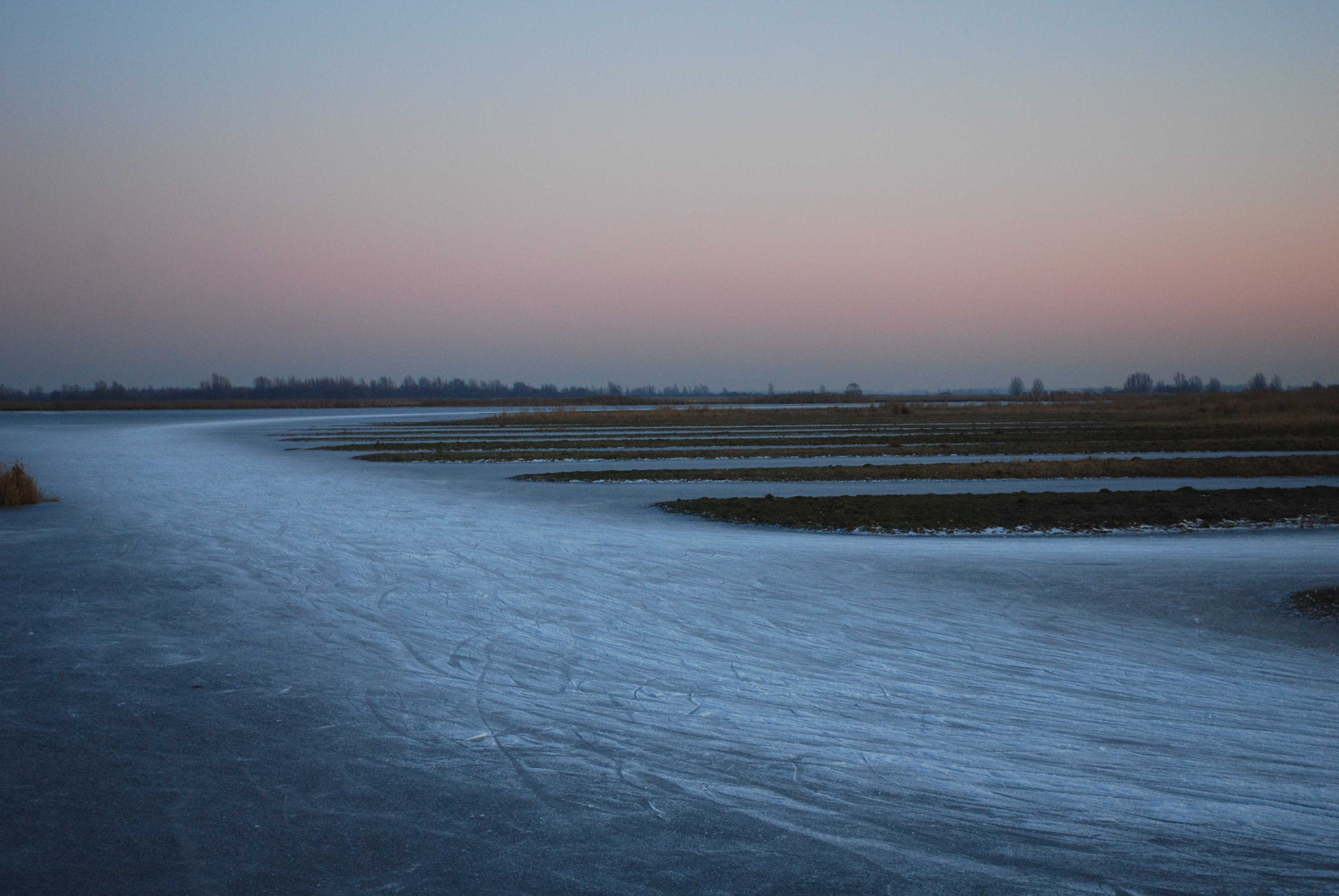 Winters Ezumakeeg